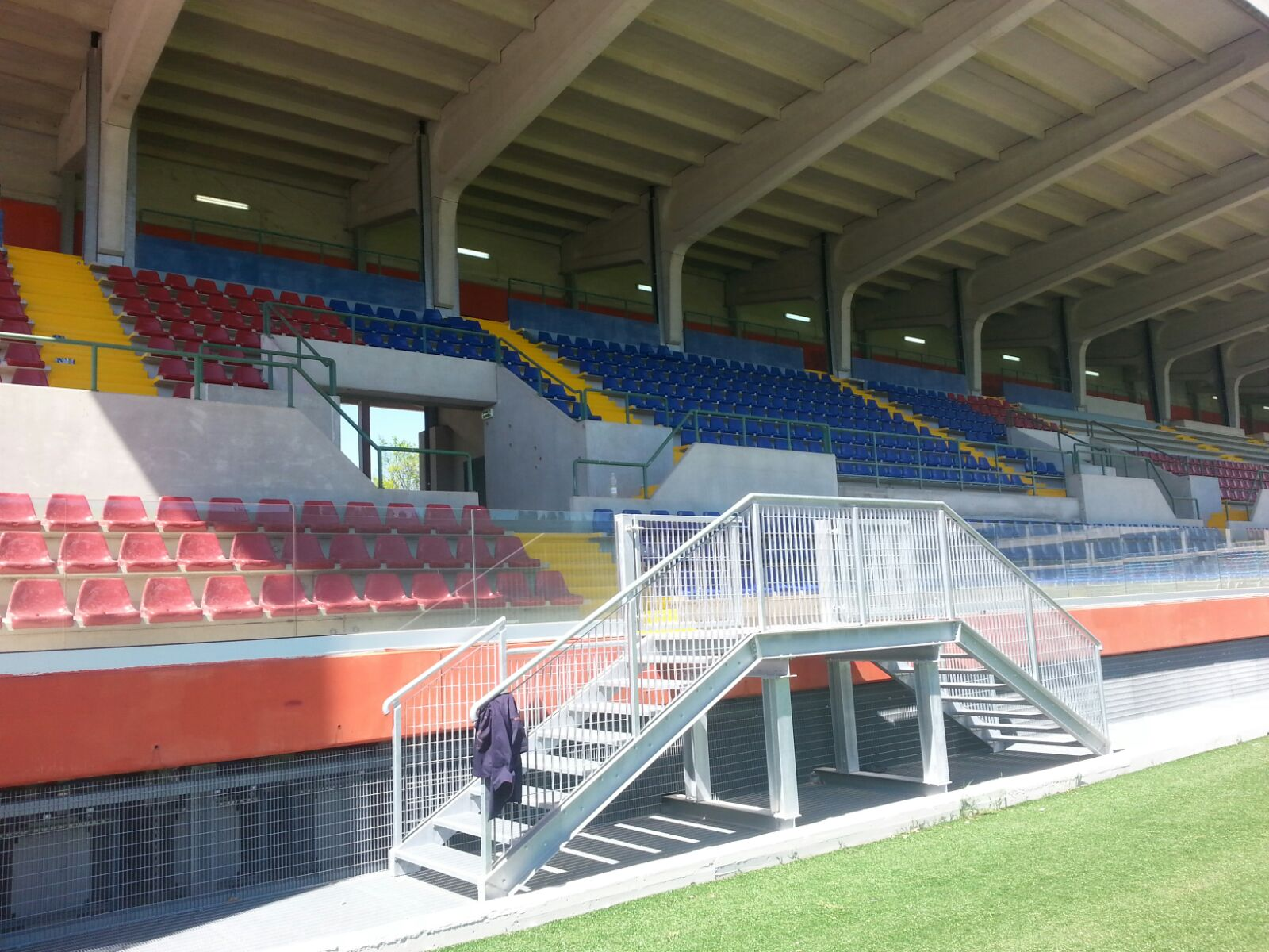 Interno dello stadio Gran Sasso d'Italia durante la posa dei seggiolini in Tribuna Ovest.